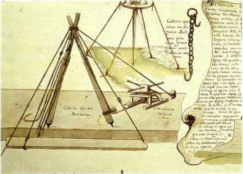 Imagen de manuscrito. Libro: Diccionario demostrativo con la configuración ó anathomia de toda la architectura naval moderna. 1719-56.